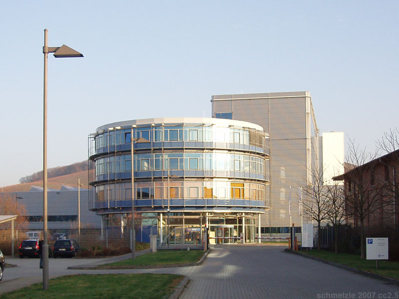 Gebäude der Heilbronner Stimme in Heilbronn